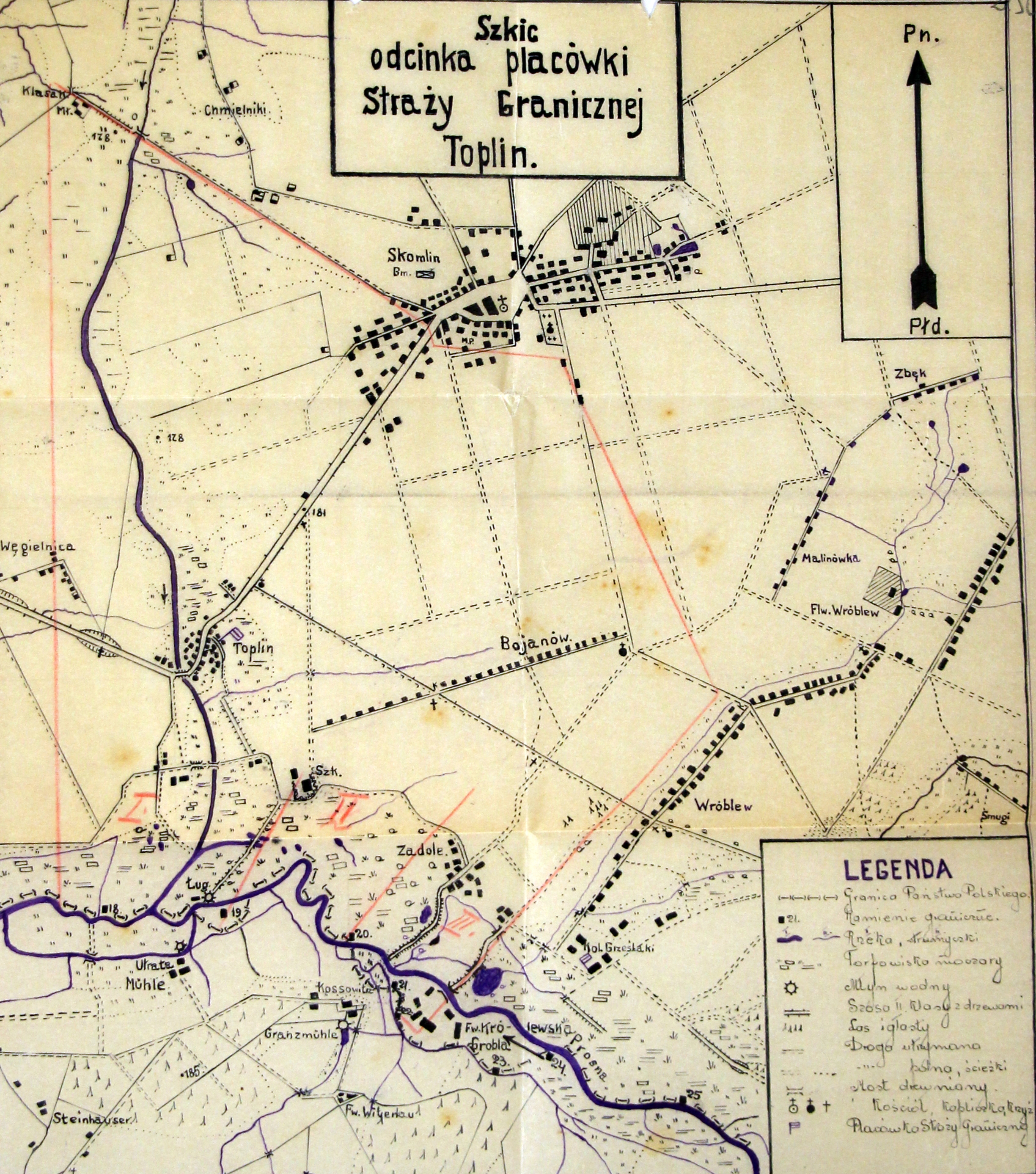 Szkic placówki SG Topolin - lata 30. XX wieku